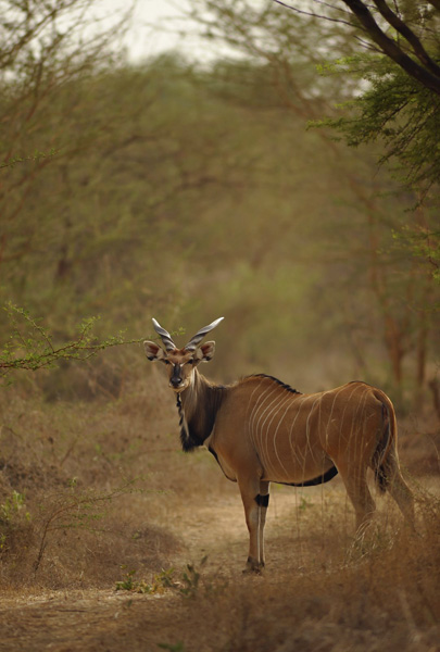 Antilopa Derbyho (Taurotragus derbianus derbianus)